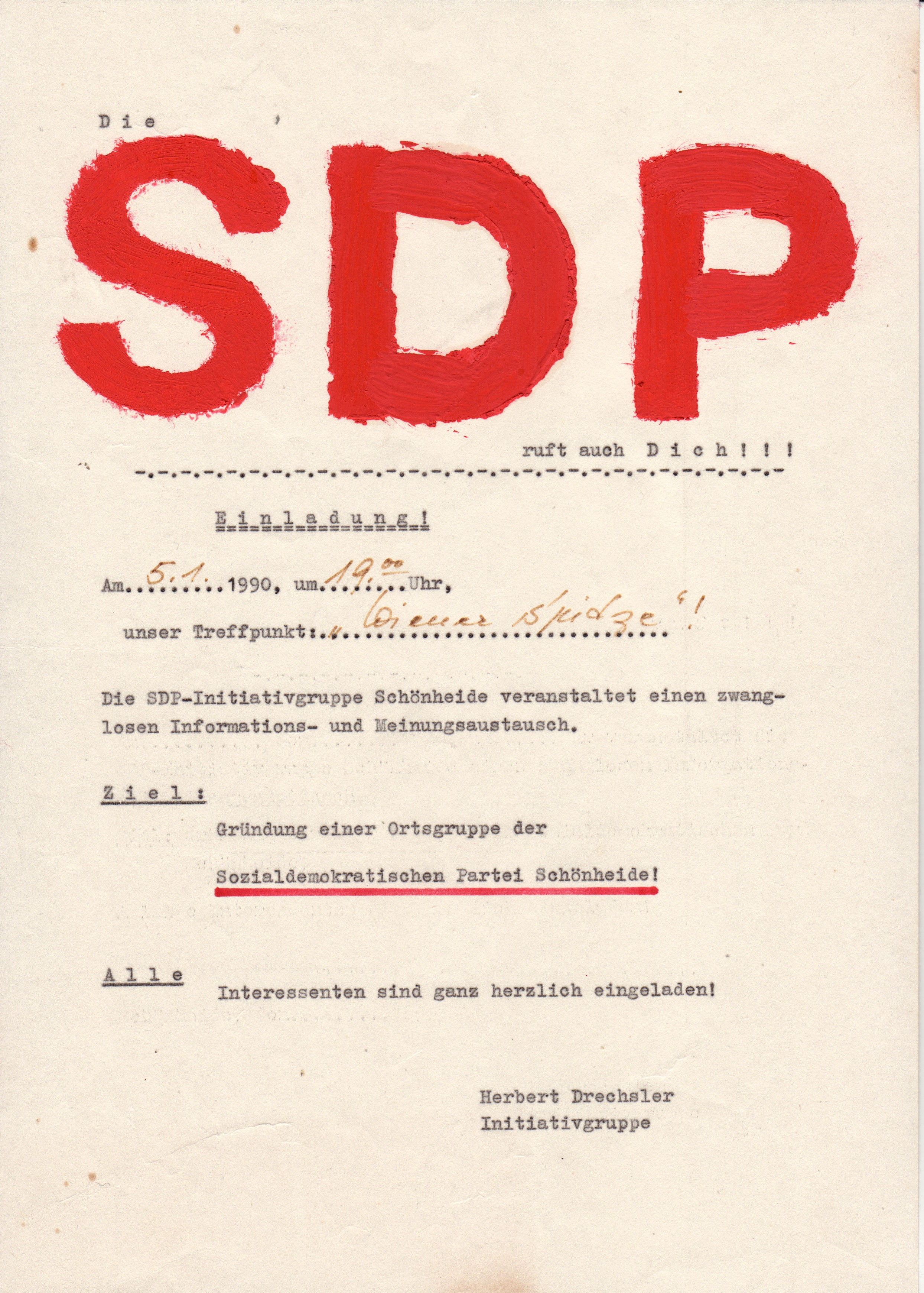 Schönheide: Die Ortsgruppe Schönheide der Sozialdemokratischen Partei wurde am 5. Januar 1990 in der Gaststätte Wiener Spitze neu gegründet. Zur Gründung hatte Helmut Drechsler aufgerufen. Sein im Aufruf war mit Schreibmaschine geschrieben, zusätzliche Seiten waren durch das Einlegen von Kohlepapier entstanden. Als Blickfang war auf dem kleinen Plakat im Format DIN A 4 im oberen Drittel mit roter Farbe aus einem Tuschkasten groß die Abkürzung SDP aufgemalt. SDP stand für die Sozialdemokratische Partei in der DDR. Sie war am 7. Oktober 1989 im Pfarrhaus des brandenburgischen Ortes Schwante gegründet worden. Bewusst hatten die Gründerinnen und Gründer diesen Tag gewählt: Es war der 40. Jahrestag der Gründung der DDR, ein Feiertag als Tag der Republik (DDR). Die 40 Gründer um Martin Gutzeit aus Oranienburg und Markus Meckel aus Magdeburg wollten deutlich machen: Es gibt eine bessere Zukunft als die SED-Diktatur.Die SPD hatte in Schönheide eine Ortsgruppe, die mit Sicherheit schon in der Zeit des Kaiserreichs, also weit vor 1900, entstanden war. Sie wurde 1933 von den Nationalsozialisten verboten. Nach der Neugründung nach dem Ende des Zweiten Weltkrieges (Tag der Befreiung am 8. Mai 1945) ging die SPD in der Sowjetischen Besatzungszone erneut unter: Aus ihrer zwangsweisen Vereinigung mit der KPD im Jahr 1946 entstand die SED. Auch die Gründung der SDP am 7. Oktober 1989 gehörte mit zu den Aktivitäten, die zum Ende des SED-Regimes führten.